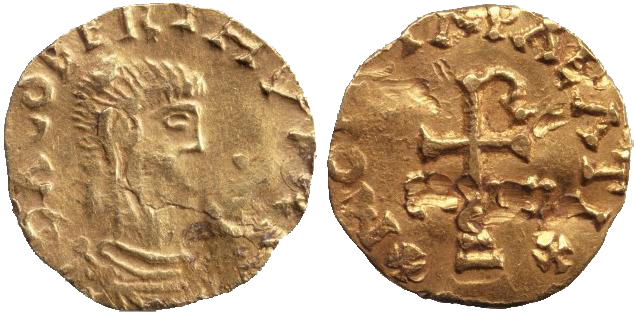 Tiers de sou du Palais aux noms de Dagobert Ier et saint Eloi. BNF, monnaies, médailles et antiques. Avers : Buste drapé et cuirassé à droite. Revers : Croix chrismée sur trois degrés.